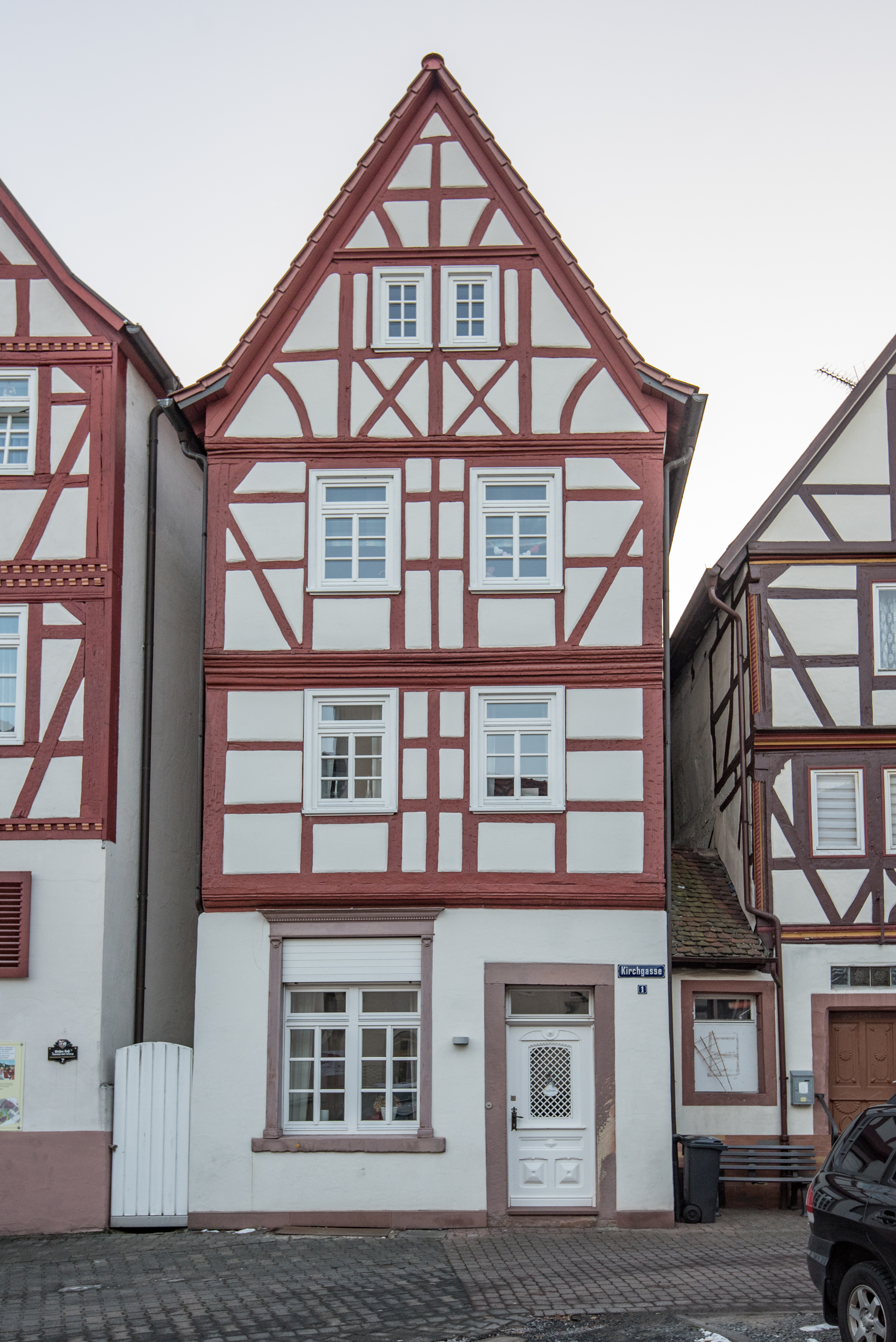 Bad Orb, Kirchgasse 1